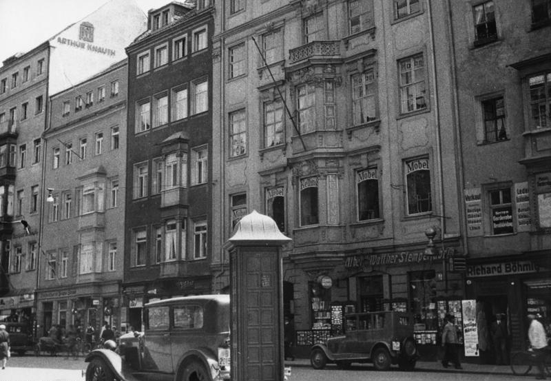 Dresden, Sachsen Grosse Brüdergasse 39